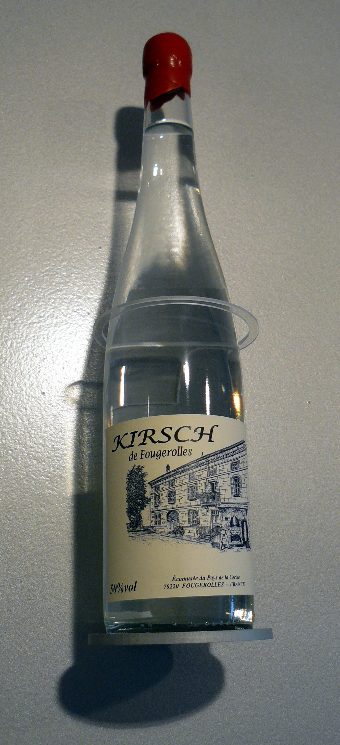 Bouteille de kirsch de Fougerolles (Ecomusée de Fougerolles, Haute-Saône, France)